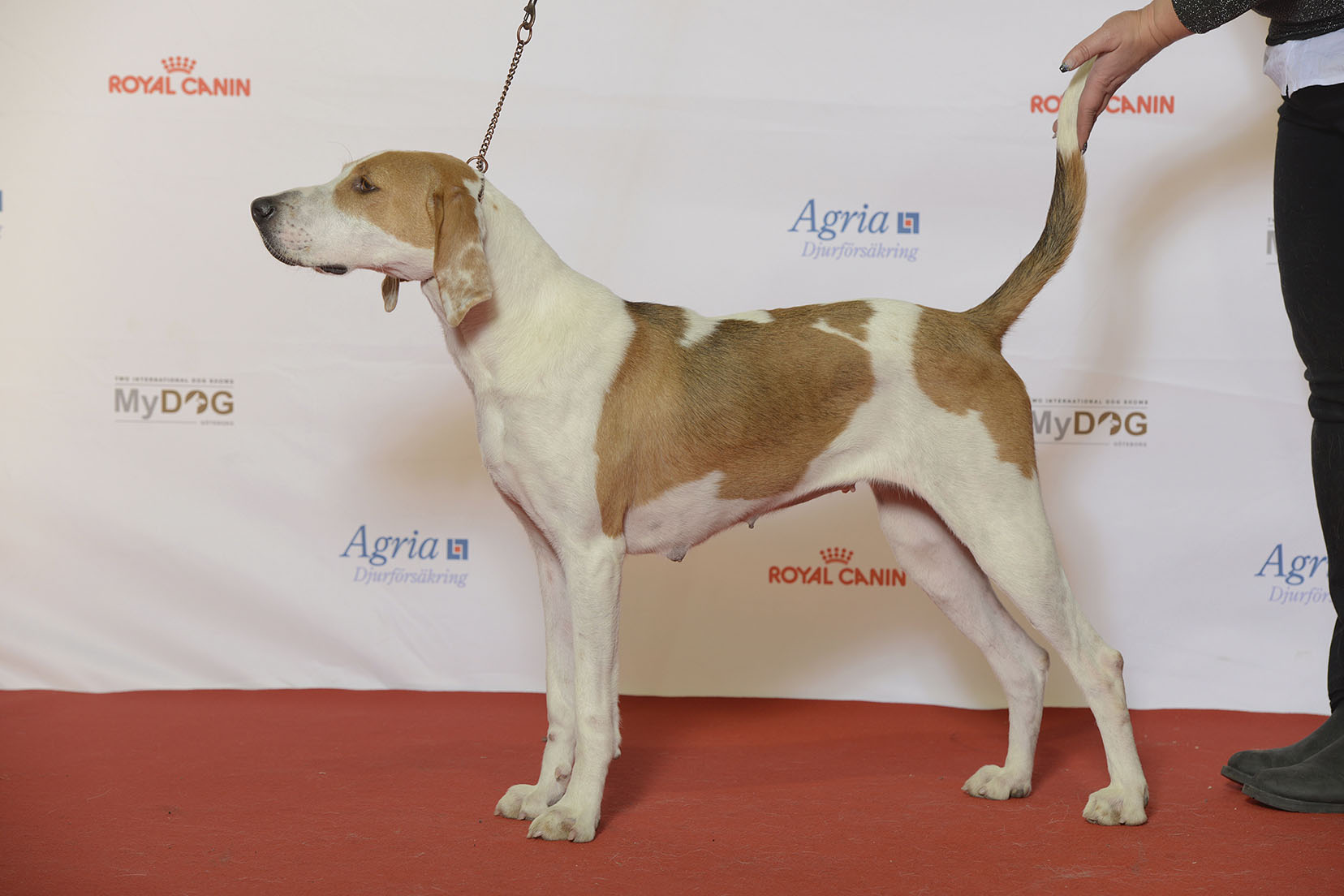 BIR Grupp 6 AMERICAN FOXHOUND Jääräpää Flikka MyDOG, Nordens största hundevenemang